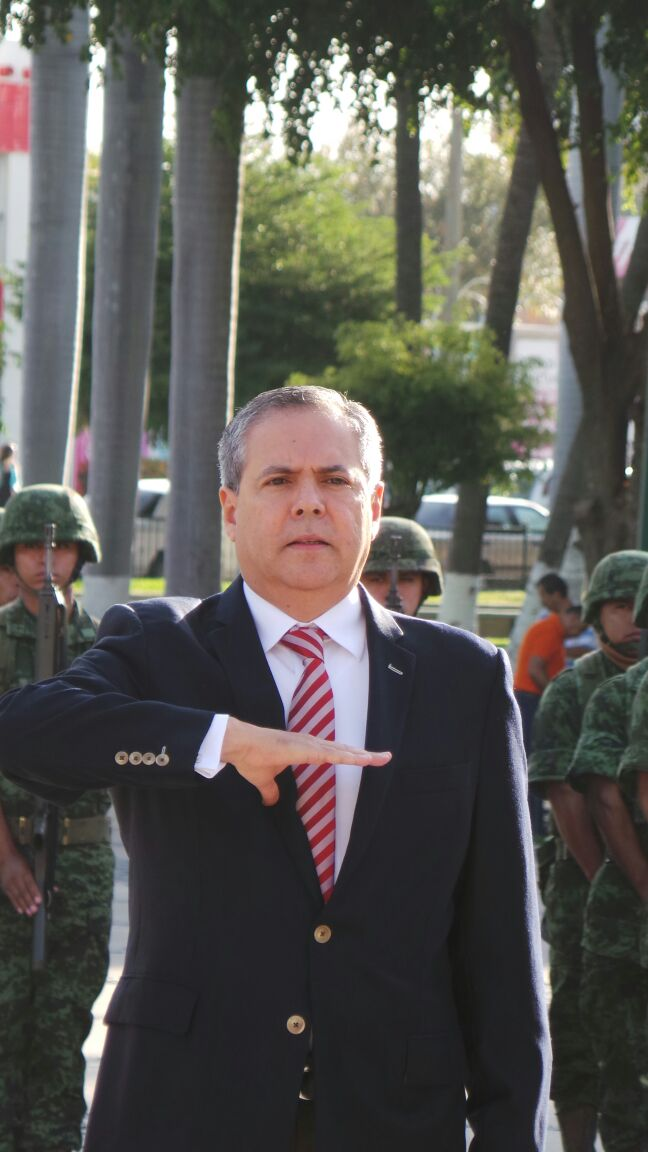 Lic. GVL